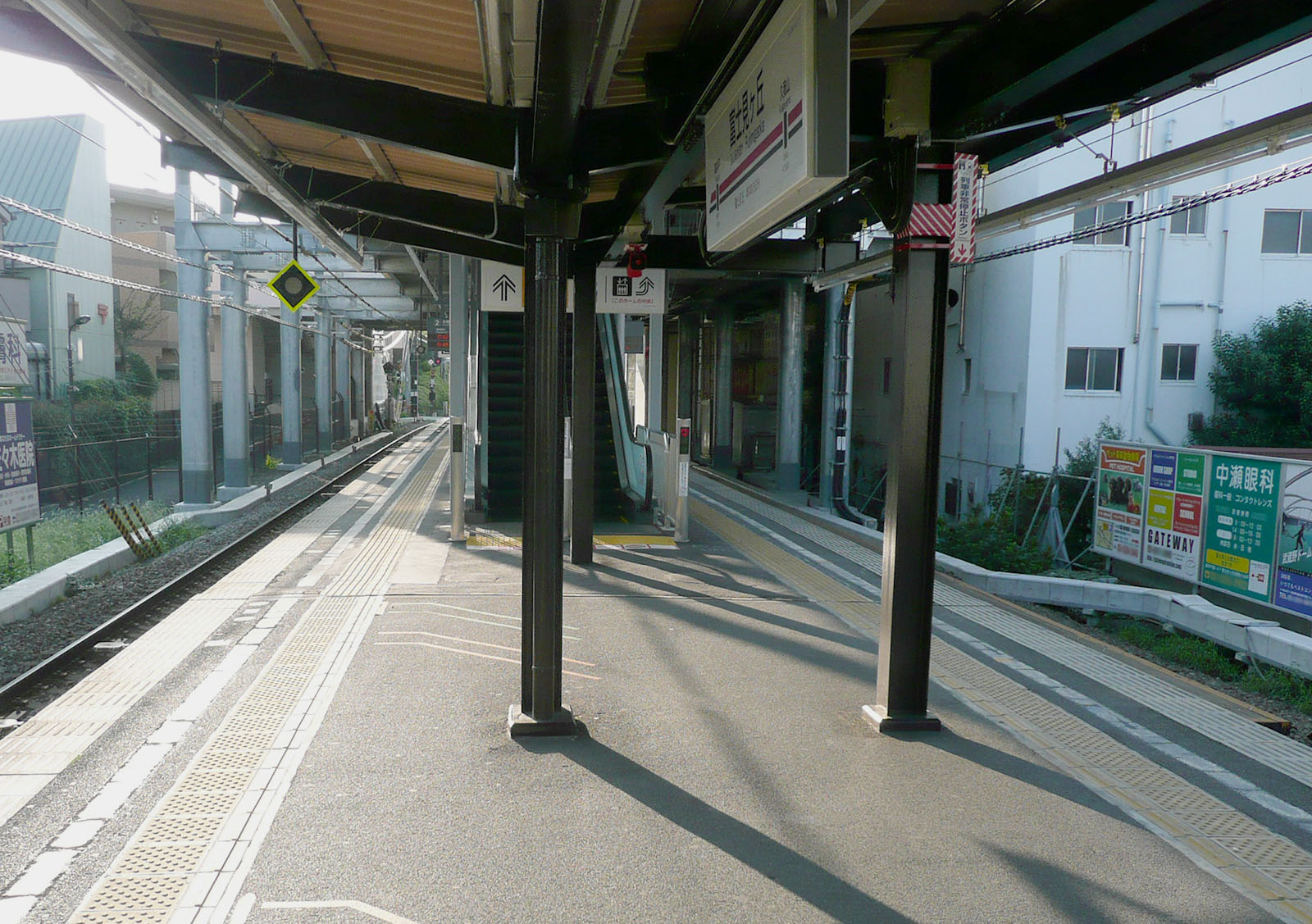 富士見ヶ丘駅ホーム